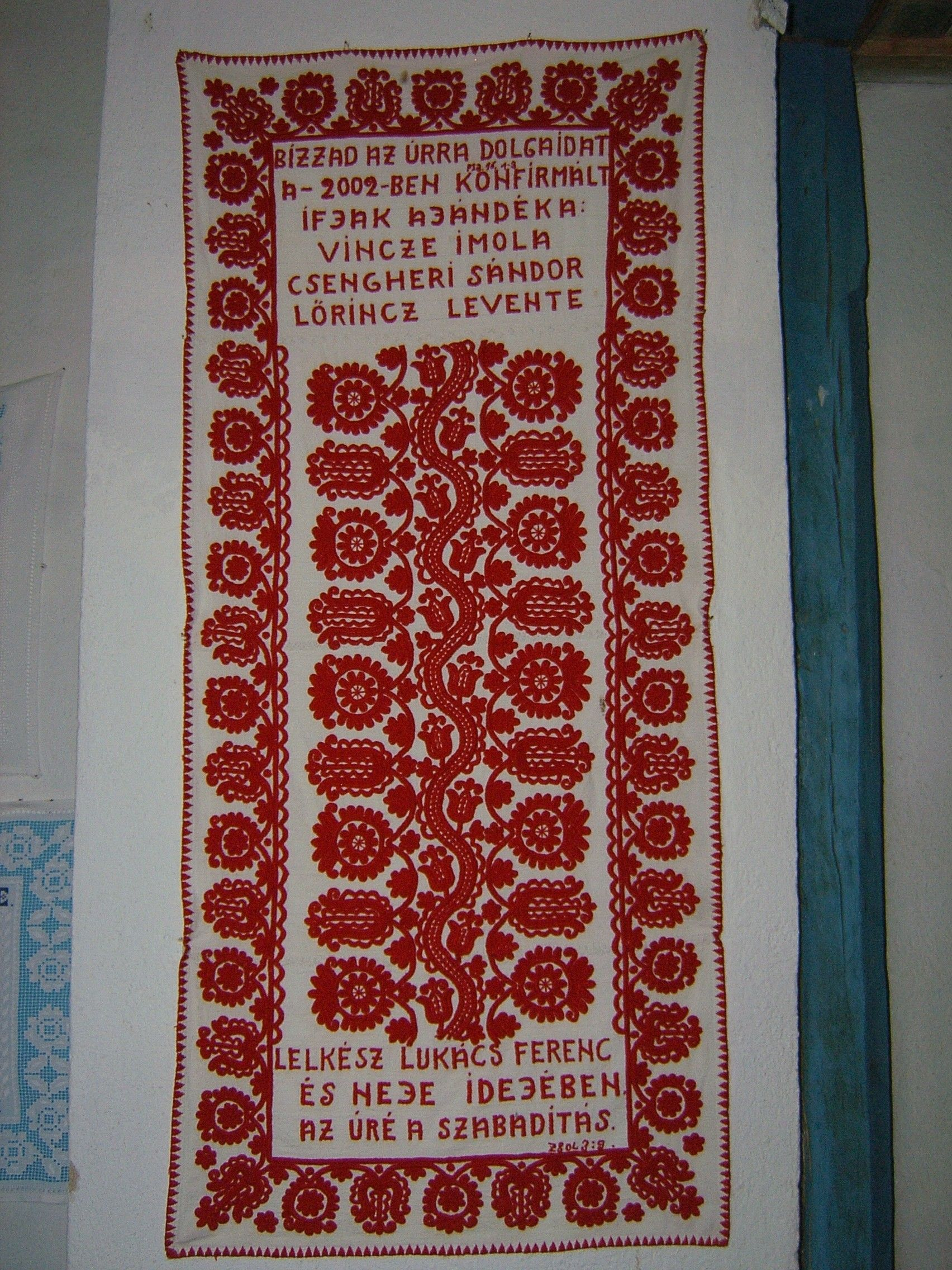 A magyarvalkói templom falvédője